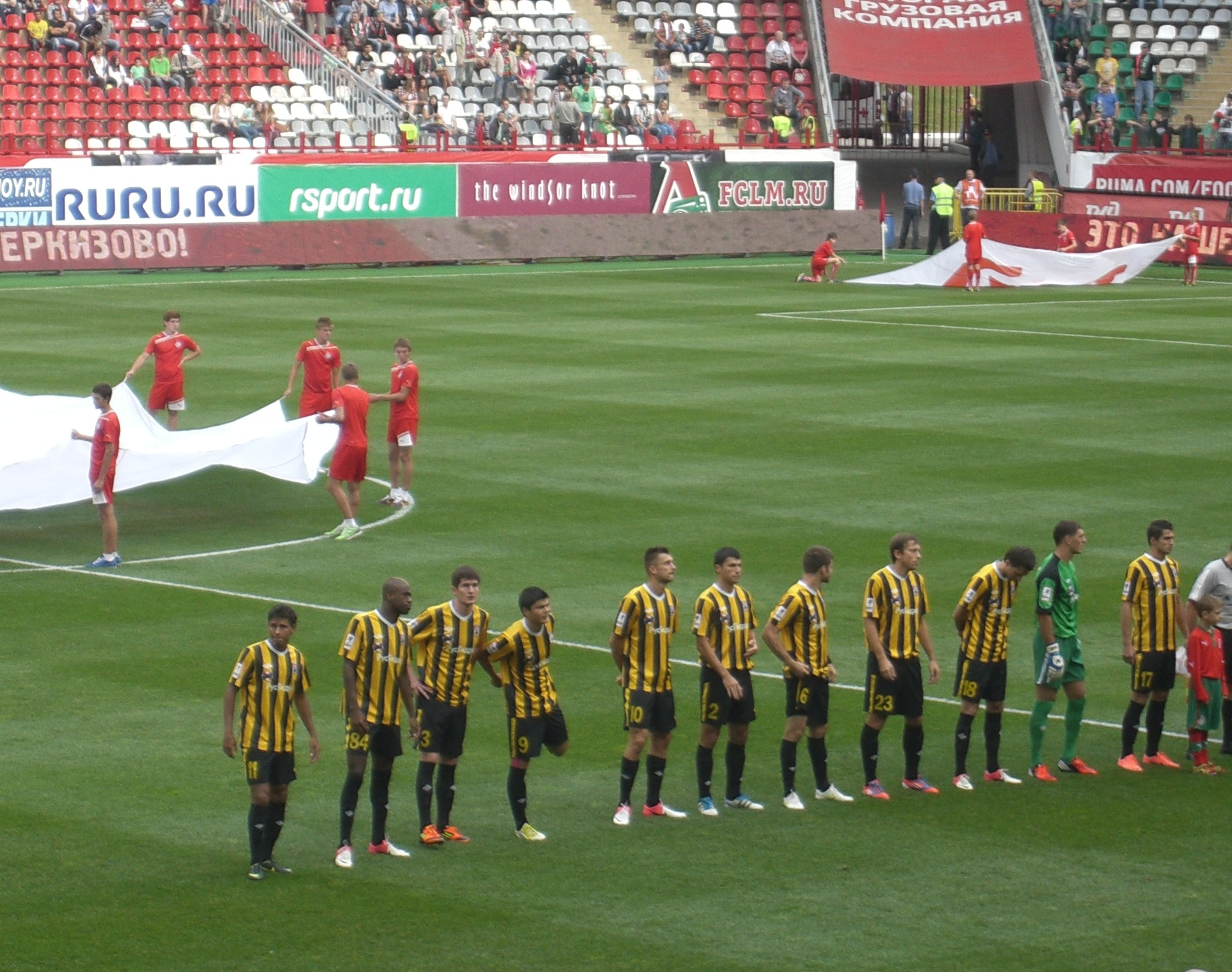 ФК "Алания" 12.08.2012 на стадионе "Локомотив", матч с Локомотивом (Москва)